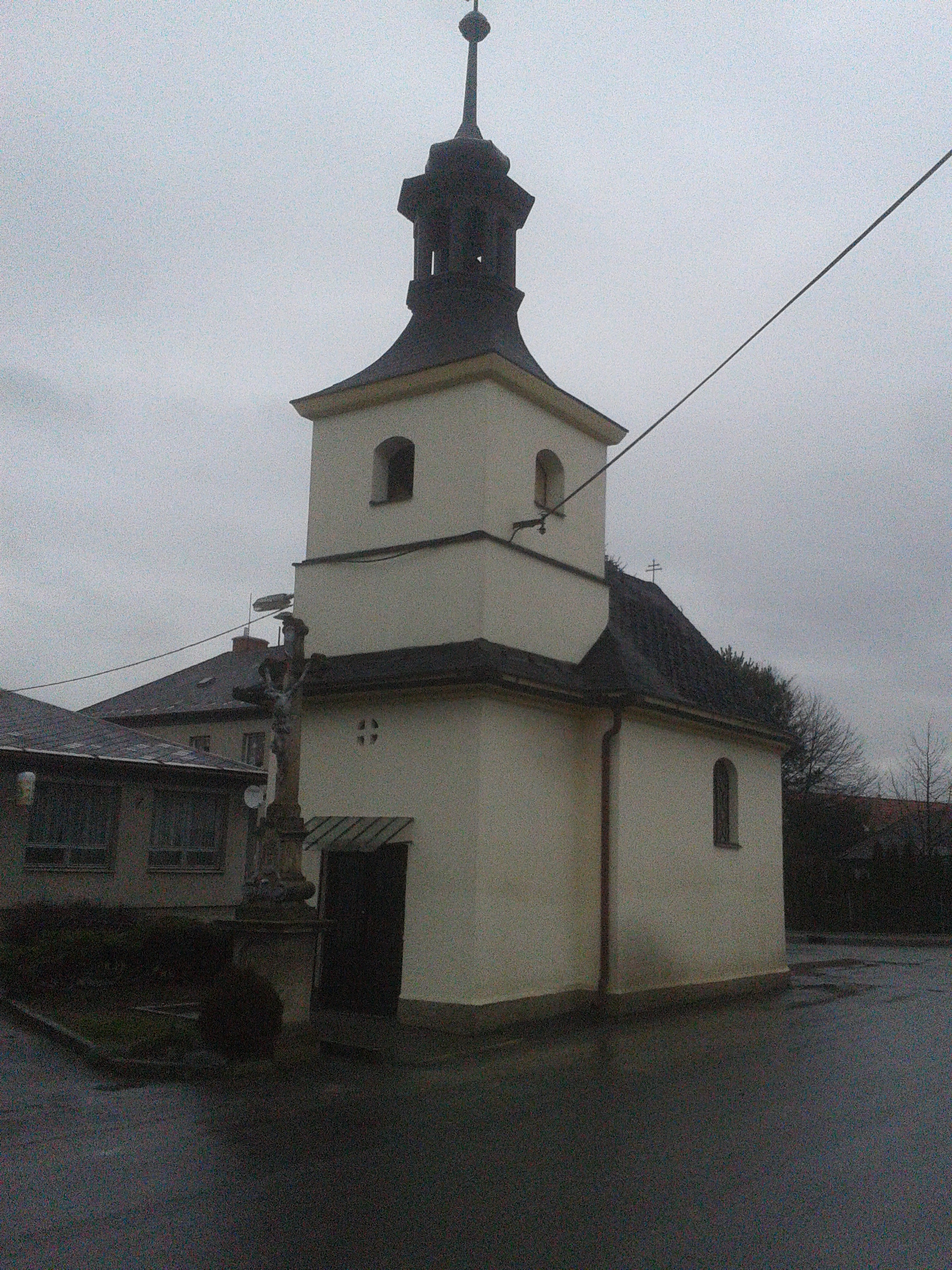 Bohuslavice kaplička 01